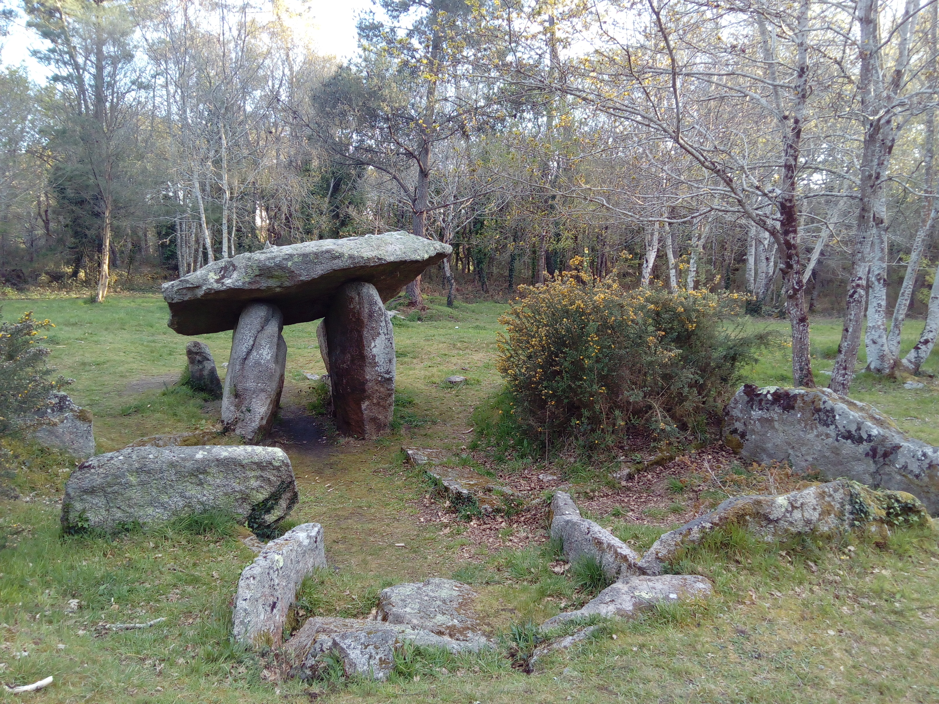 Ensemble de Quélarn, détail